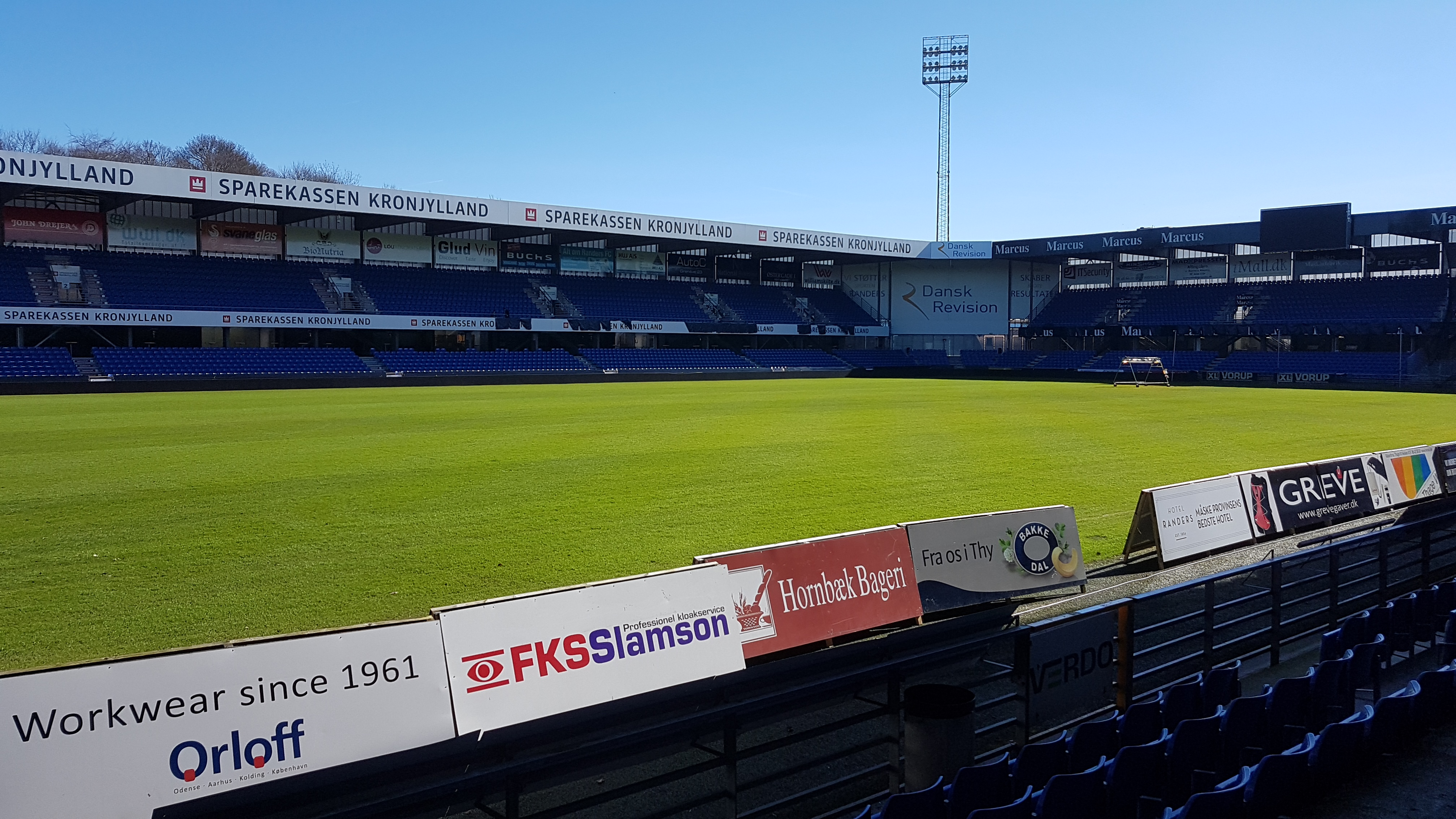 BioNutria Park Randers